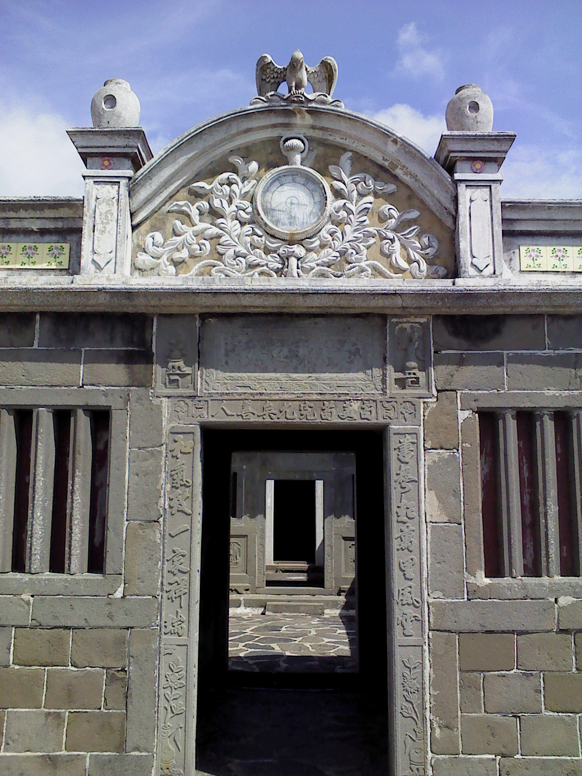 澎湖二崁陳宅第一進大門